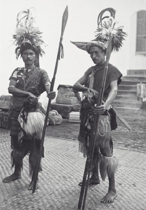 foto. Portret van twee krijgers uit Kisar bij de decorstukken van een fotostudio